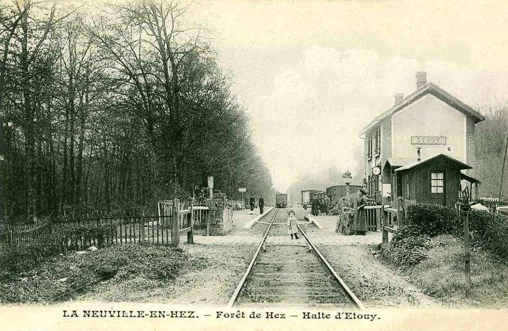 Vue d'ensemble de la halte et du passage à niveau.